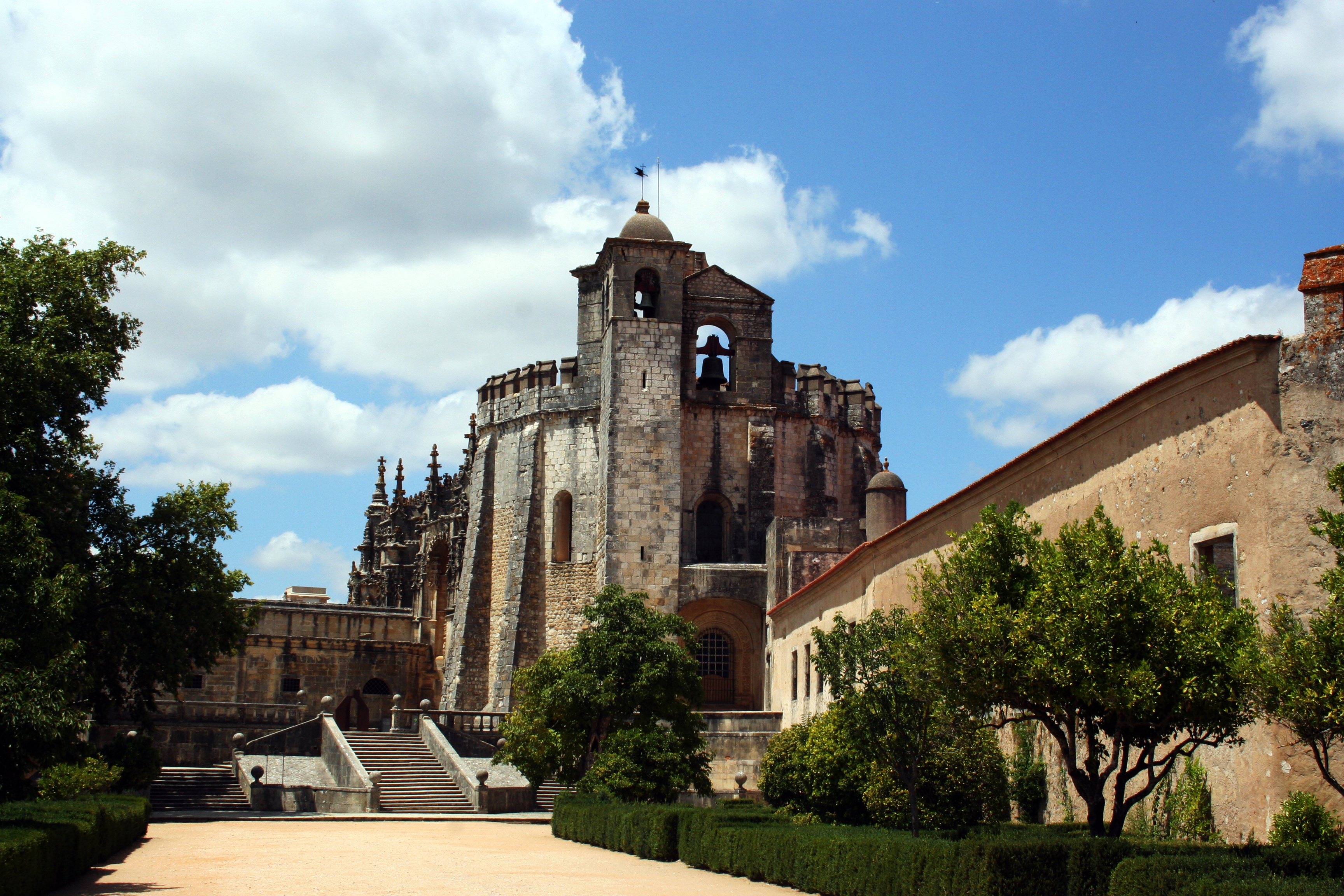 Category:Convent of Christ (Tomar)